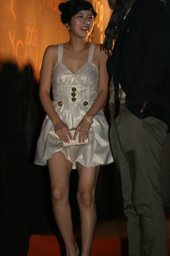 2008 스타일 아이콘 어워즈